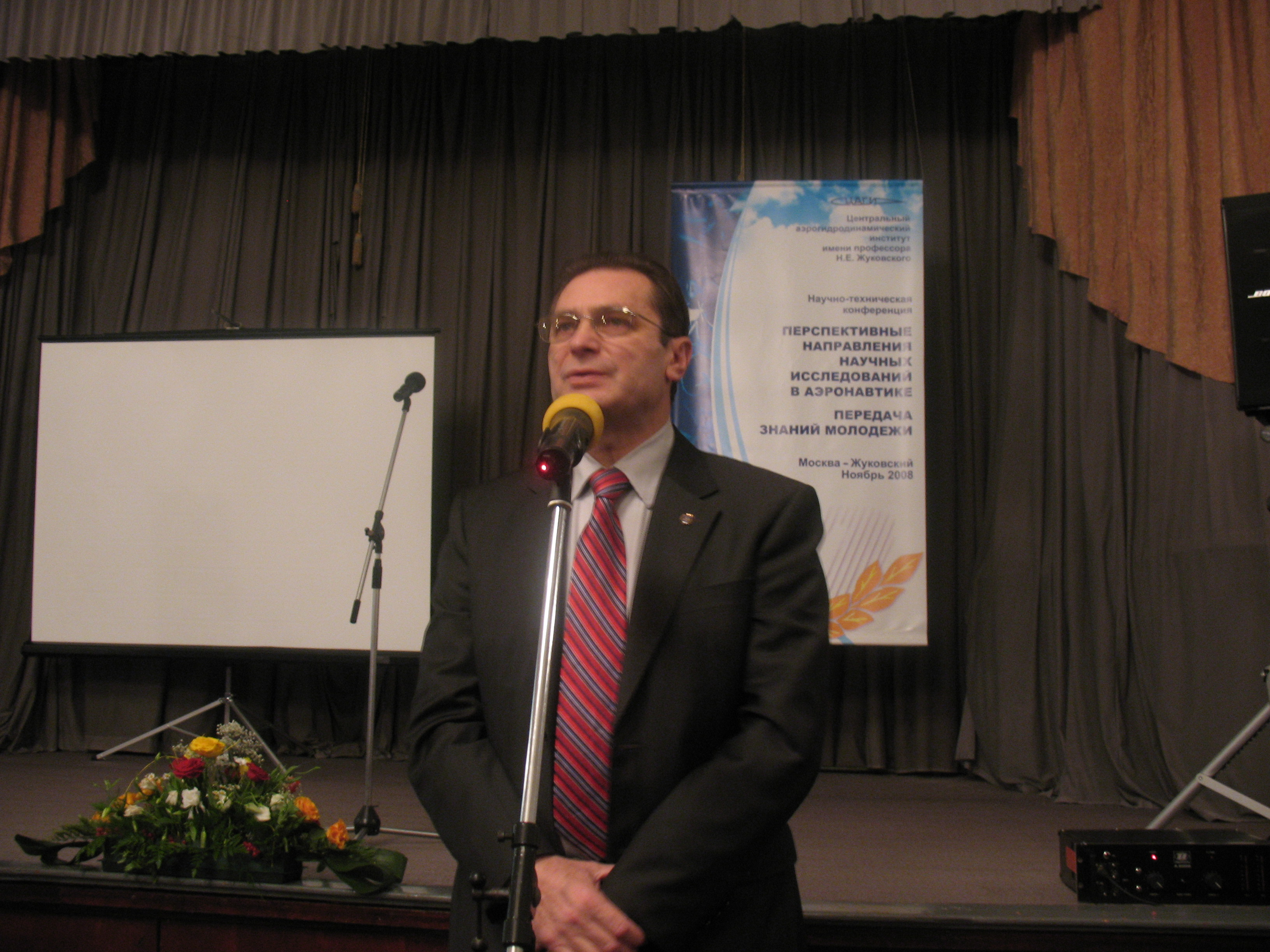 Директор ЦАГИ С.Л. Чернышов выступает на юбилее ЦАГИ в Доме учёных ЦАГИ